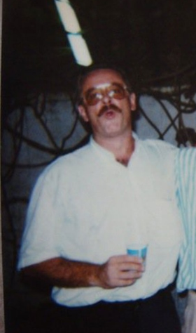 Ivano Toniolo nell'immagine pubblicata da L'Espresso (